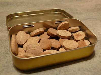 Some Fisherman's Friend lozenges.